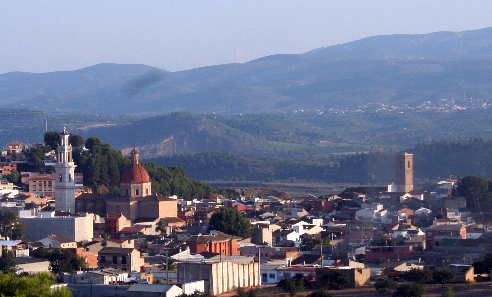 Vista desde Vinyamalata del municipio de Turis en Valencia (España)